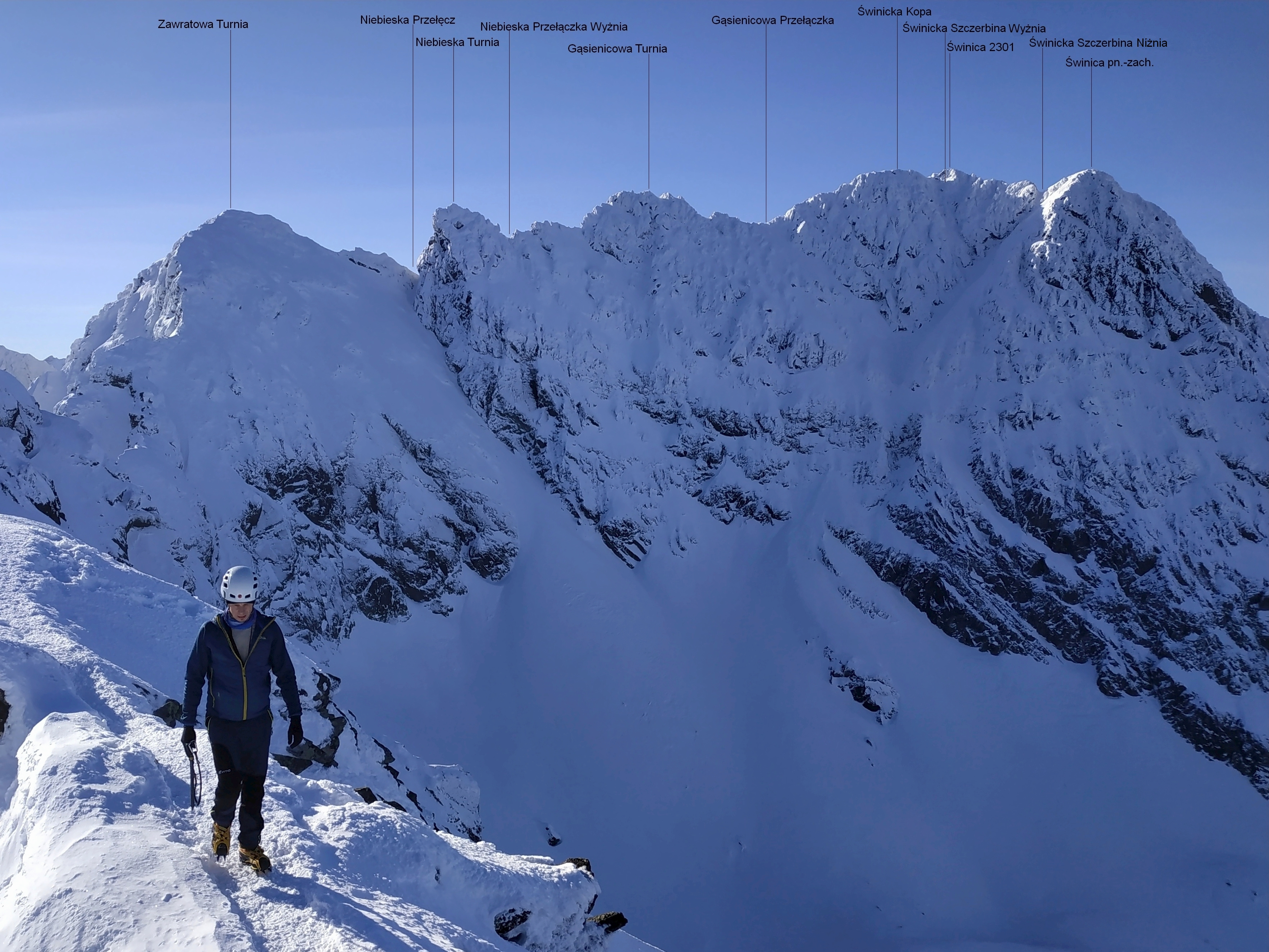 Grań Świnicy. Widok z Kościelca